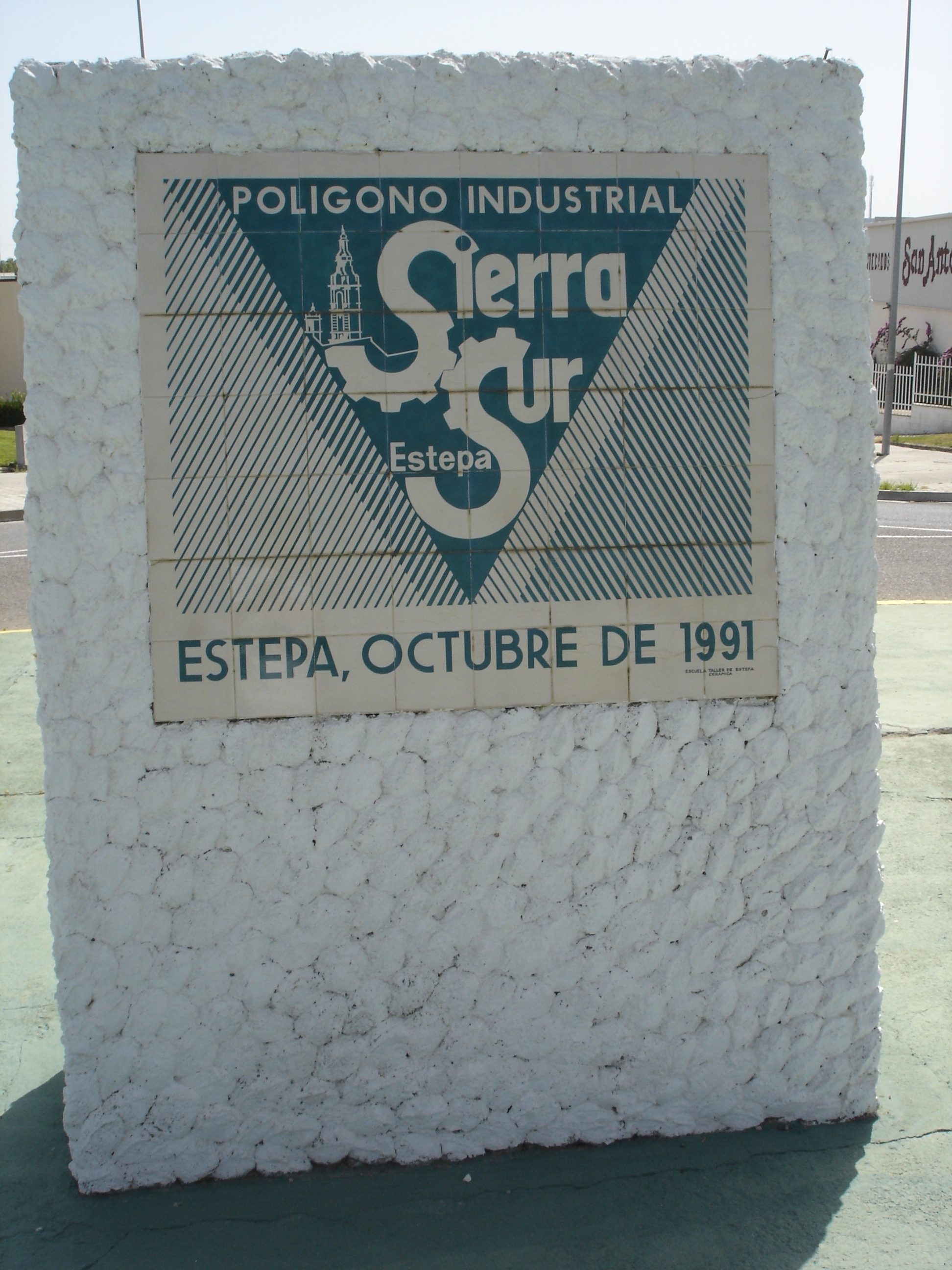 Placa conmemorativa de la inauguración del Poligono Industrial Sierra Sur, ubicado en Estepa (provincia de Sevilla).